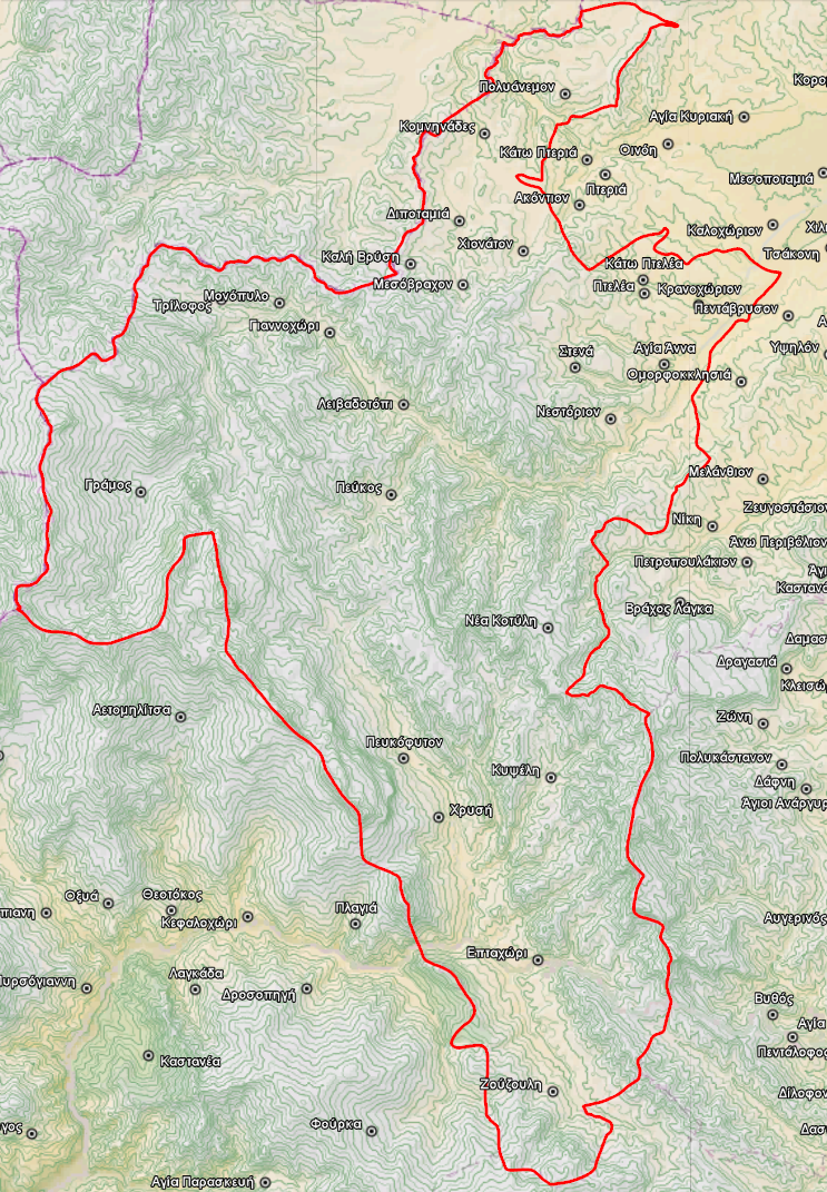 Τοπογραφικός χάρτης του Δήμου Νεστορίου